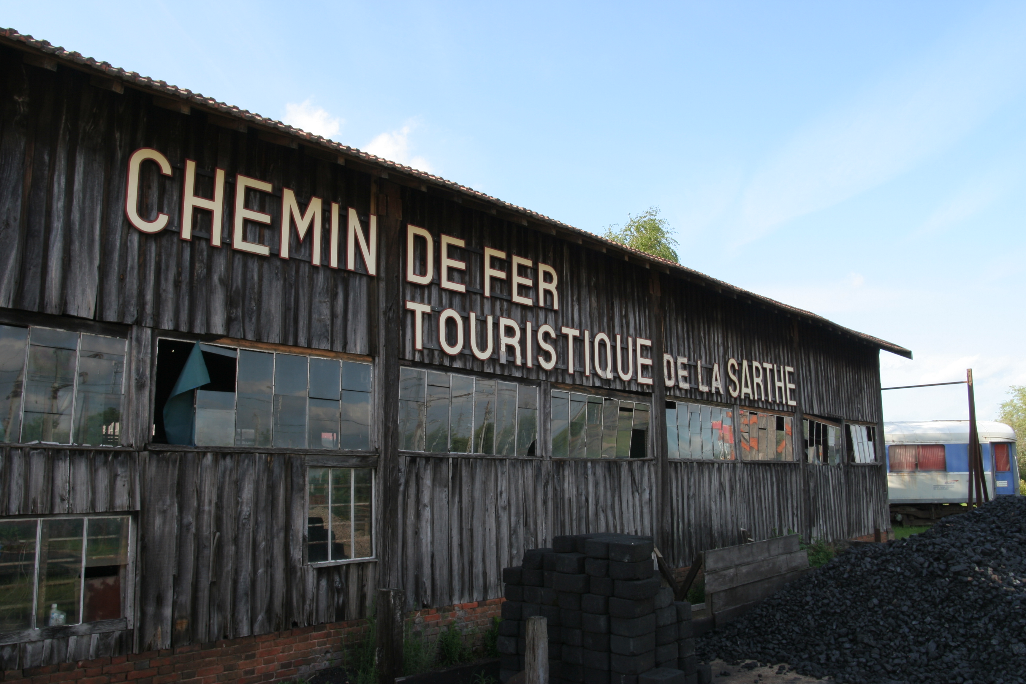 Gare et dépôt du Chemin de fer touristique de la Sarthe à Beillé.